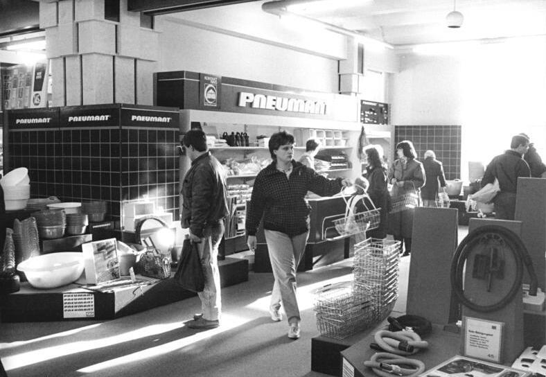 Berlin, Marzahner Tor, Blick ins Kaufhaus ADN-ZB Lehmann 5.3.90 Berlin: Einkaufsbummel- Unter dem Warenzeichen "Pneumant" werden auch im Kaufhaus Marzahner Tor Erzeugnisse für Küche und Bad angeboten.